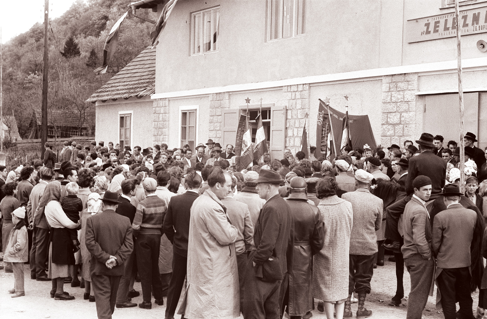 Odkritje spominske plošče pred kulturnim domom v Zgornjem Dupleku